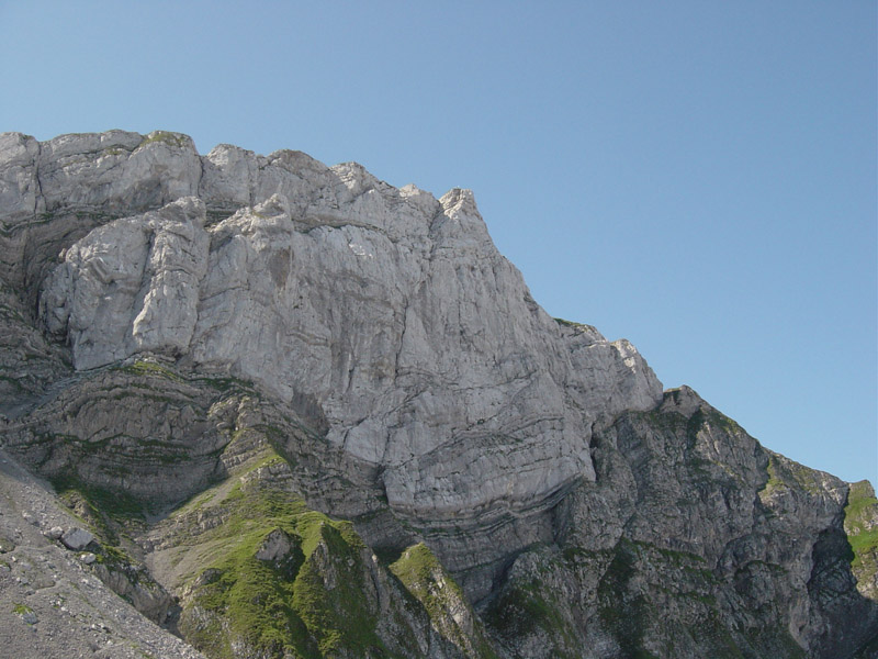 Das Tomlishorn von Norden. Der alte Tomliweg führt von den Schuttfeldern links, durch die Grasplanggen nach rechts zu den ausgeprägten Bändern (Bildmitte). Dann immer unterhalb des hellgrauen Schrattenkalks hinauf zum Ausstieg (V-förmiger Einschnitt im Grat)